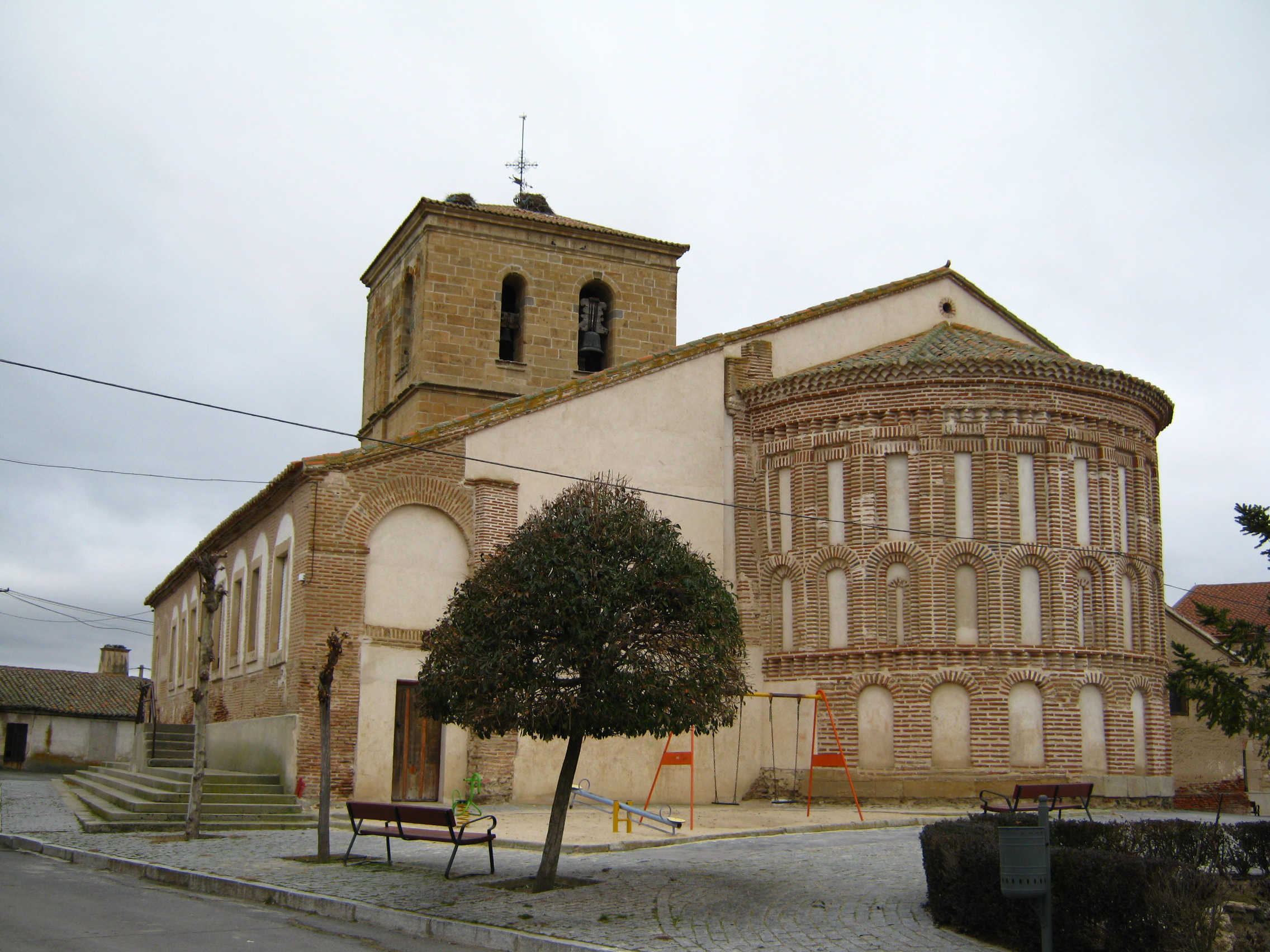 Iglesia parroquial de San Pedro ad Víncula, en Villar de Gallimazo (Salamanca, Reino de León)